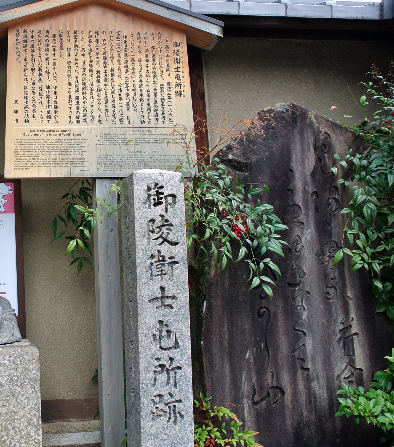 御陵衛士（高台寺党）の屯所・門前